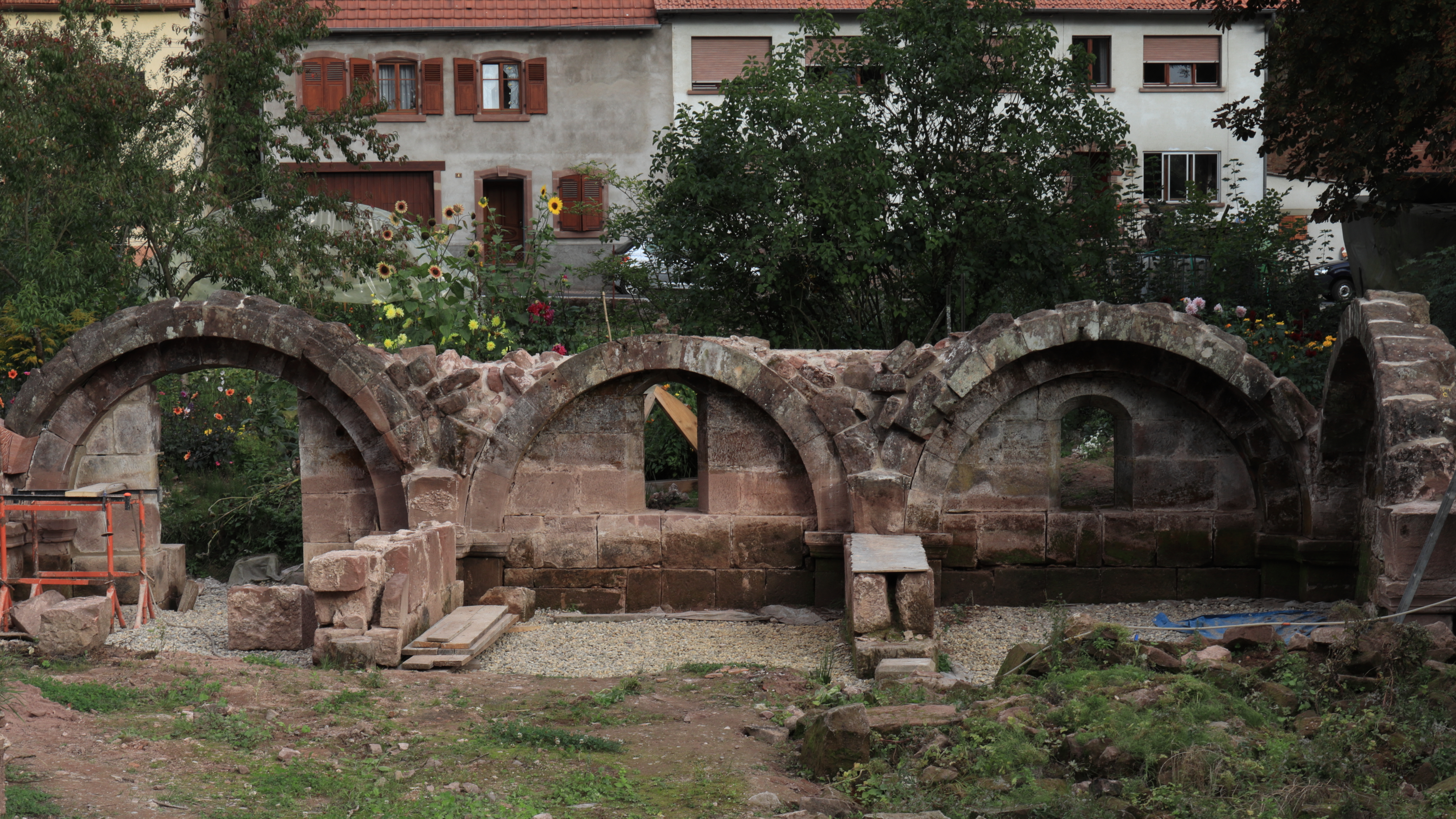 Abbaye de Graufthalvestiges